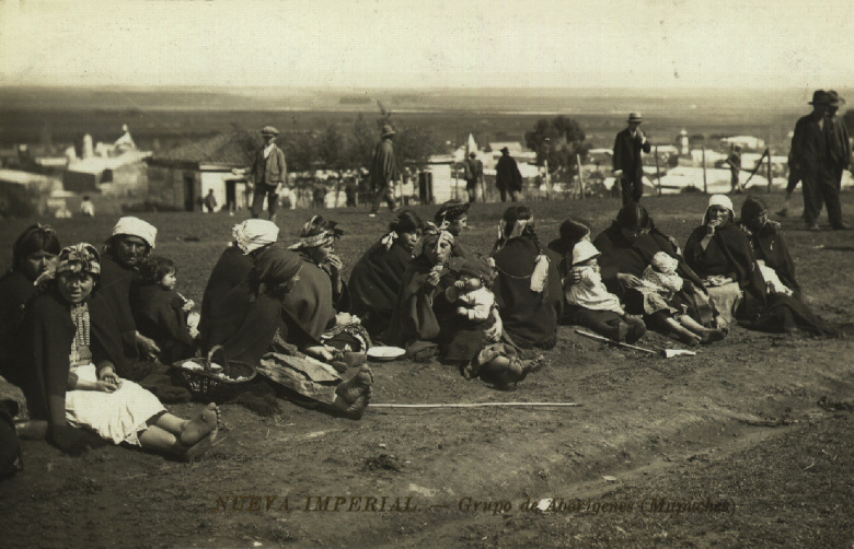 Mapuches en Nueva Imperial, Región de la Araucania, Chile.